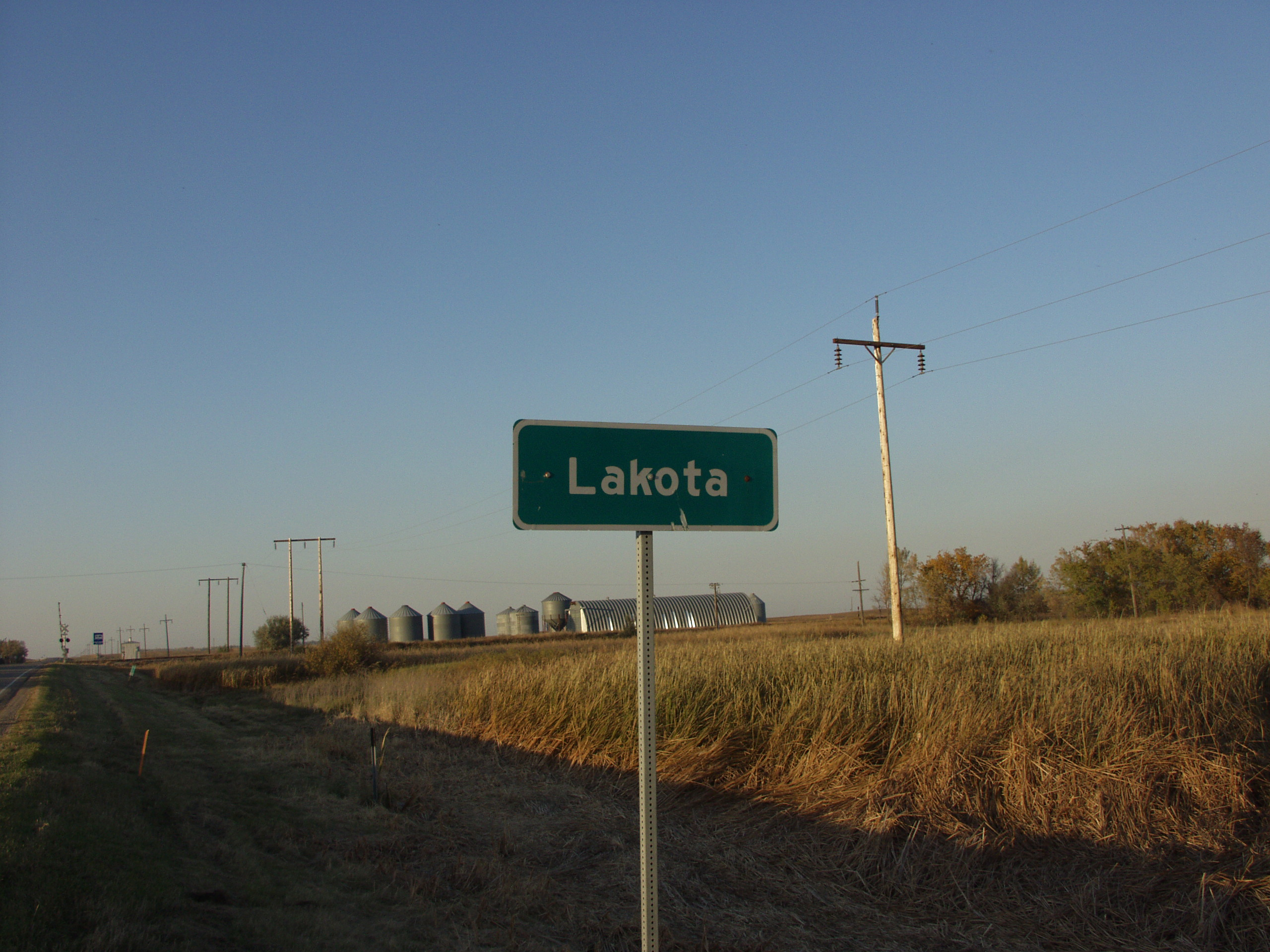 Lakota, North Dakota. From .